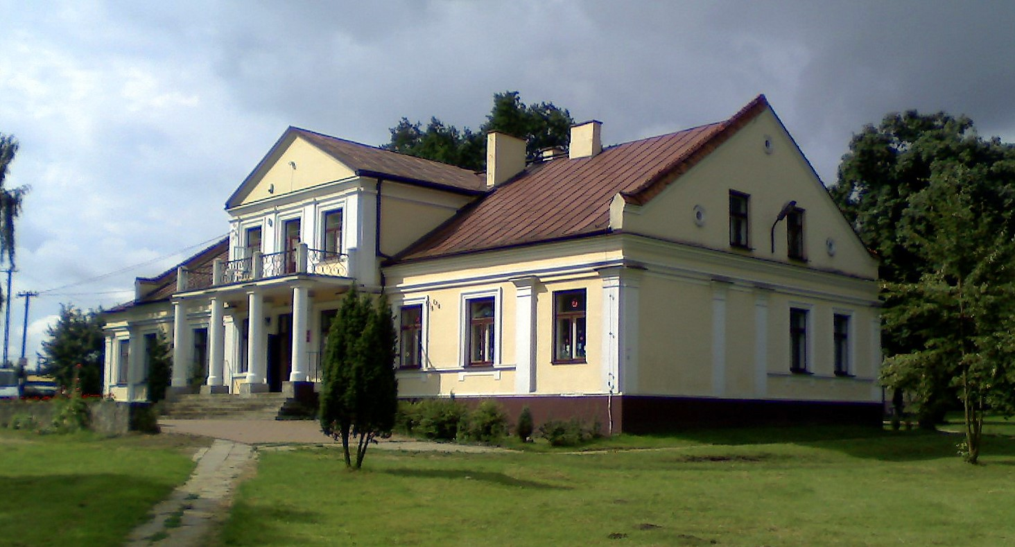 Brudzeń Duży - dwór (od lat 60. XX wieku szkoła